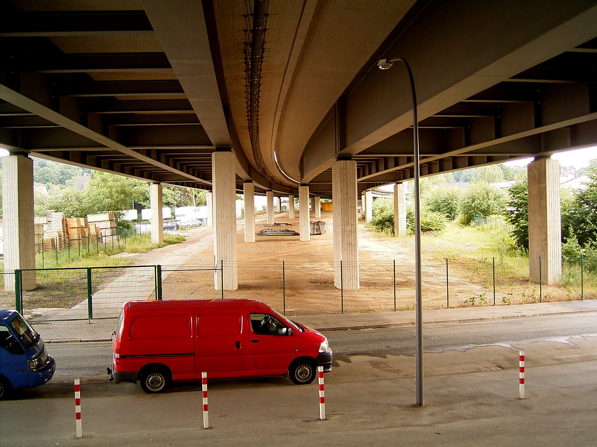 Talbrücke Langerfeld der Bundesautobahn 1 über die Schwelmer Straße (L 726, südlich) und In der Fleute (nördlich) in Wuppertal-Langerfeld: In der Fleute